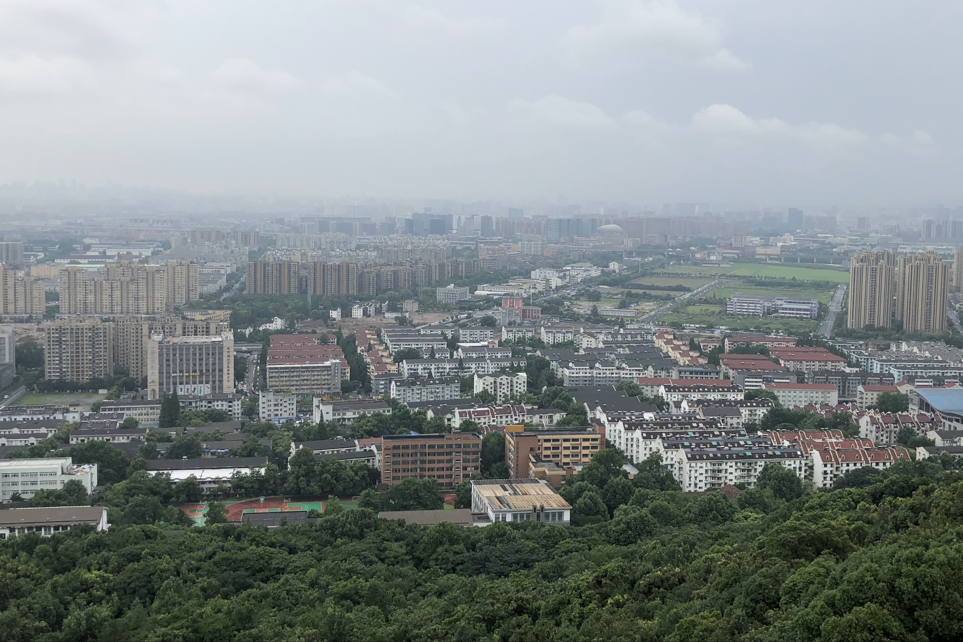 中文（中国大陆）: 翠峰阁眺望